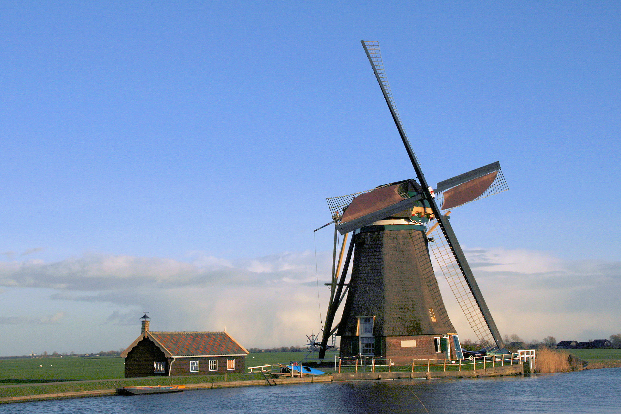 Groot-Ammers: de Achtkante Molen langs de Ammersche Boezem.